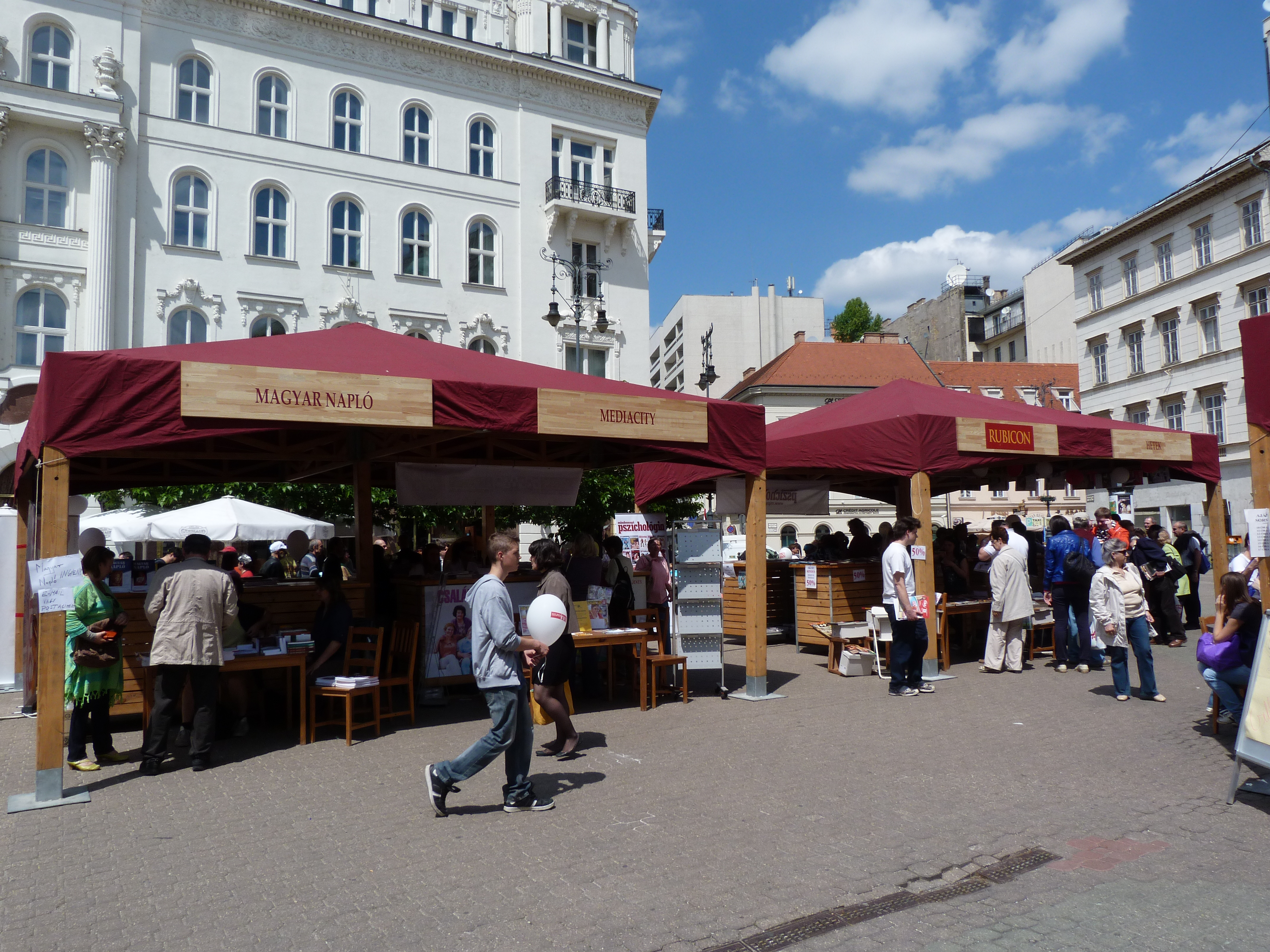 Live on the 19th of May, 2012. Budapest Downtown, Vörösmarty square. Press Fest Budapest is an annual two-day festival held in Downtown Budapest. The Festival was started to emphasize the role of the press in our society. Sponsored by Volksbank Hungary. Published under Creative Commons in the Metapolisz DVD line. A felvétel 2012. május 19 -én szombaton készült Budapesten, a Vörösmarty téren. A rendezvény kiemelet főtámogatója a Volksbank Magyarország, a nap házigazdája Rákóczi Feri. Fellépett Wolf Kati. .Megjelent Creative Commons alatt a Metapolisz DVD sorozatban.